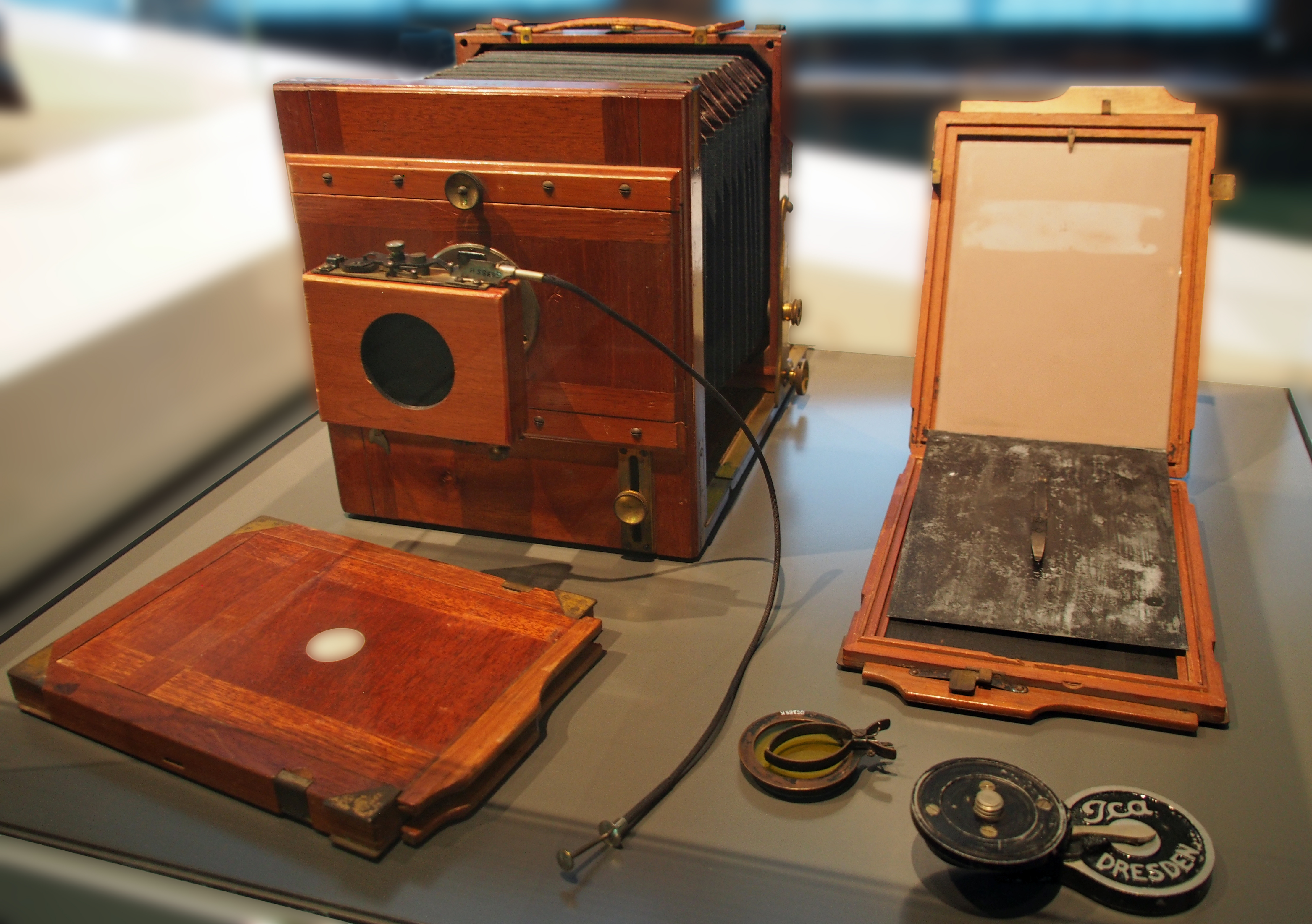 Einäugige Plattenkamera für Schwarzweiß-Fotos im Querformat 13x18 cm, mit Rollverschluss. Hersteller Ica AG Dresden